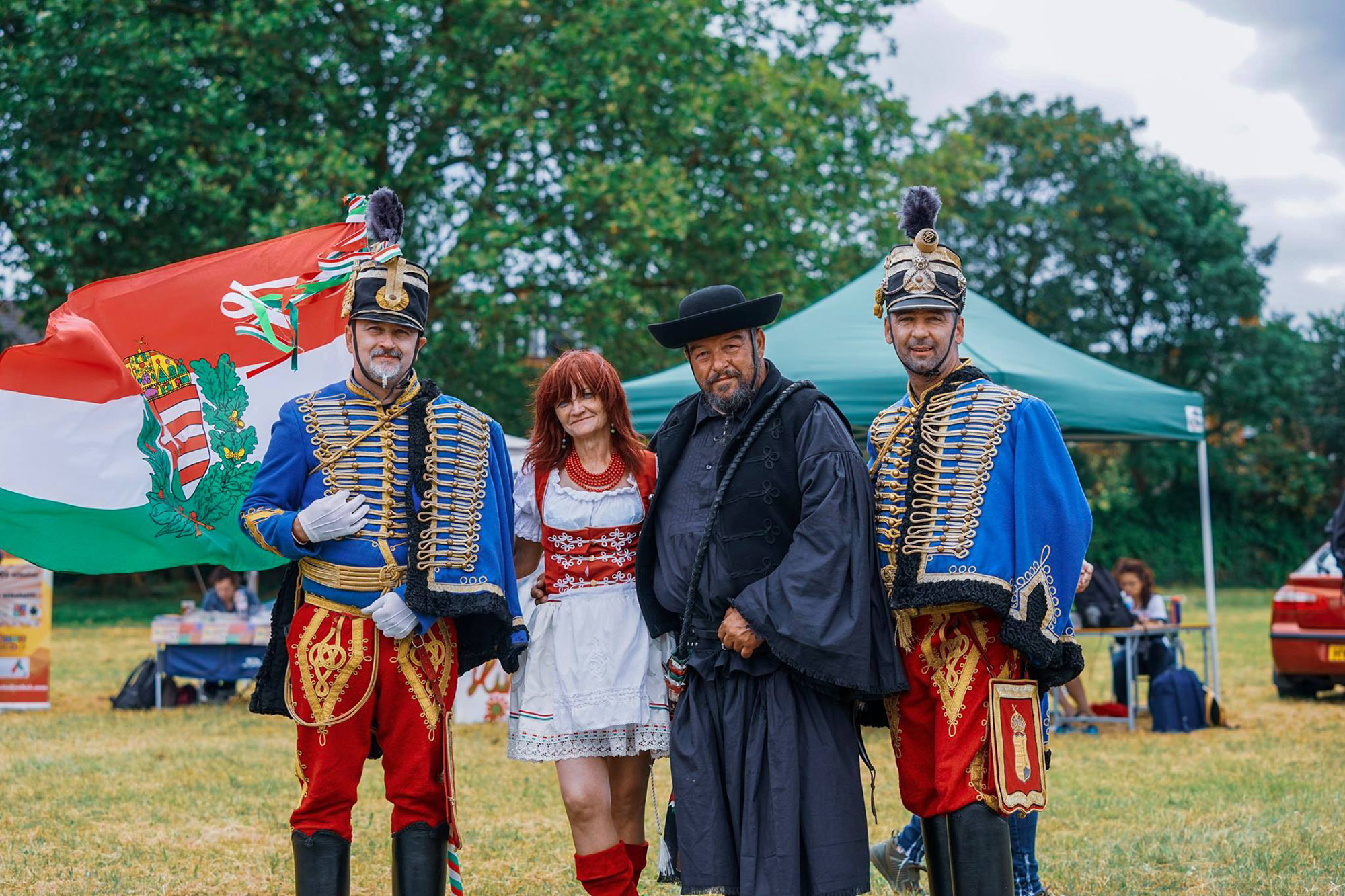 Huszárok és betyár a mátkájával a Magyar Kultúra Napján. London 2018 Készítette: Pillinger-Kerepesi Zoltán Szabadon terjeszthető / FREE TO USE